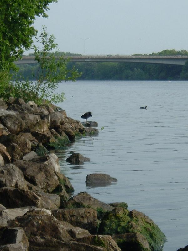 eigen foto (c) 2005 looi: Nijmegen, Hatertse brug over het Maaswaalkanaal